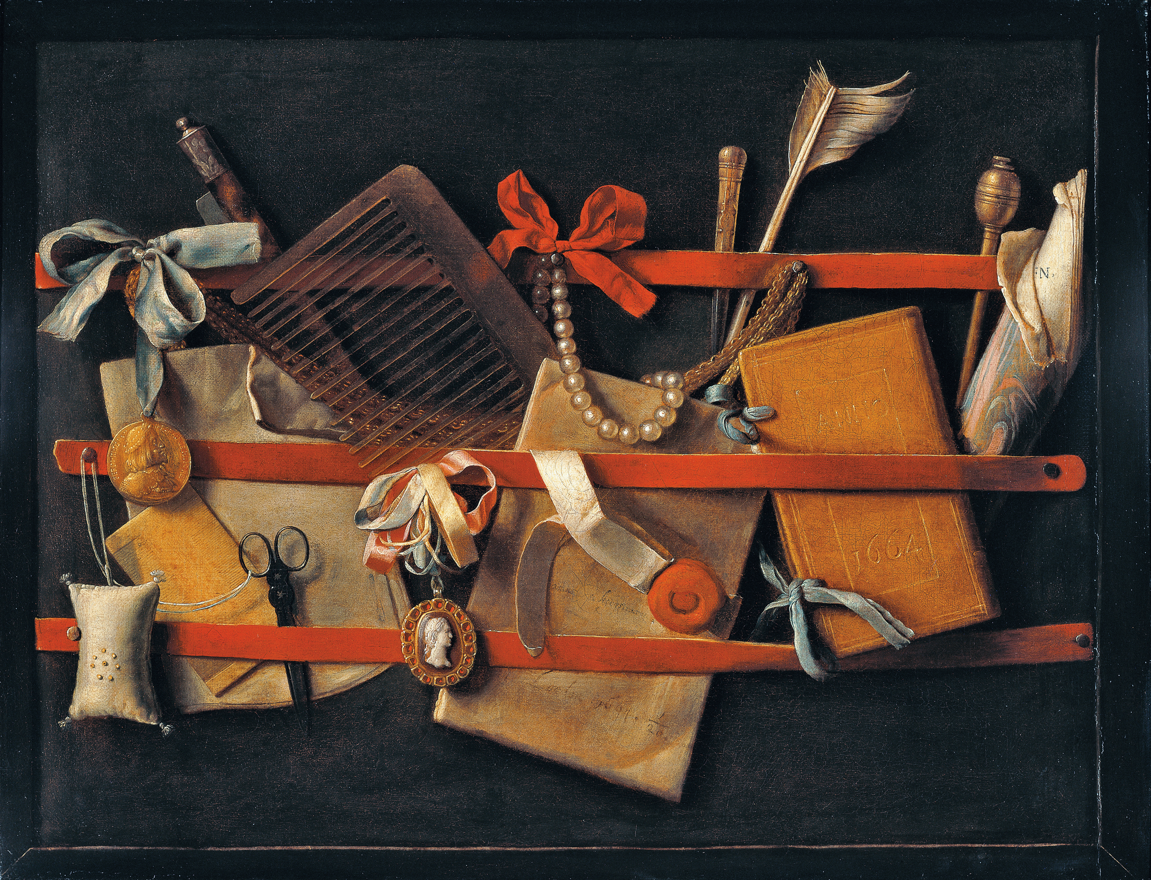 Still Life